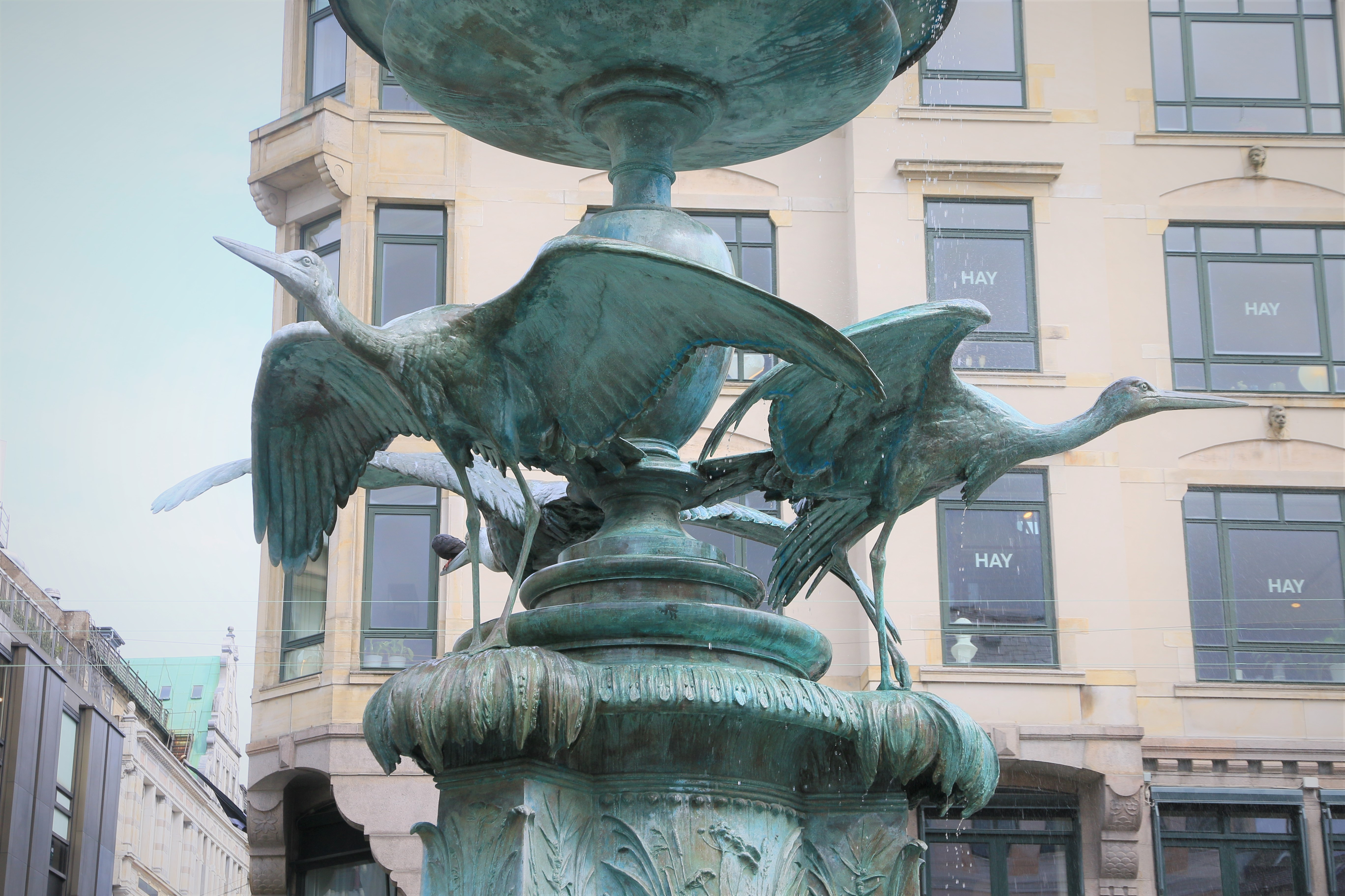 Herons in Copenhagen